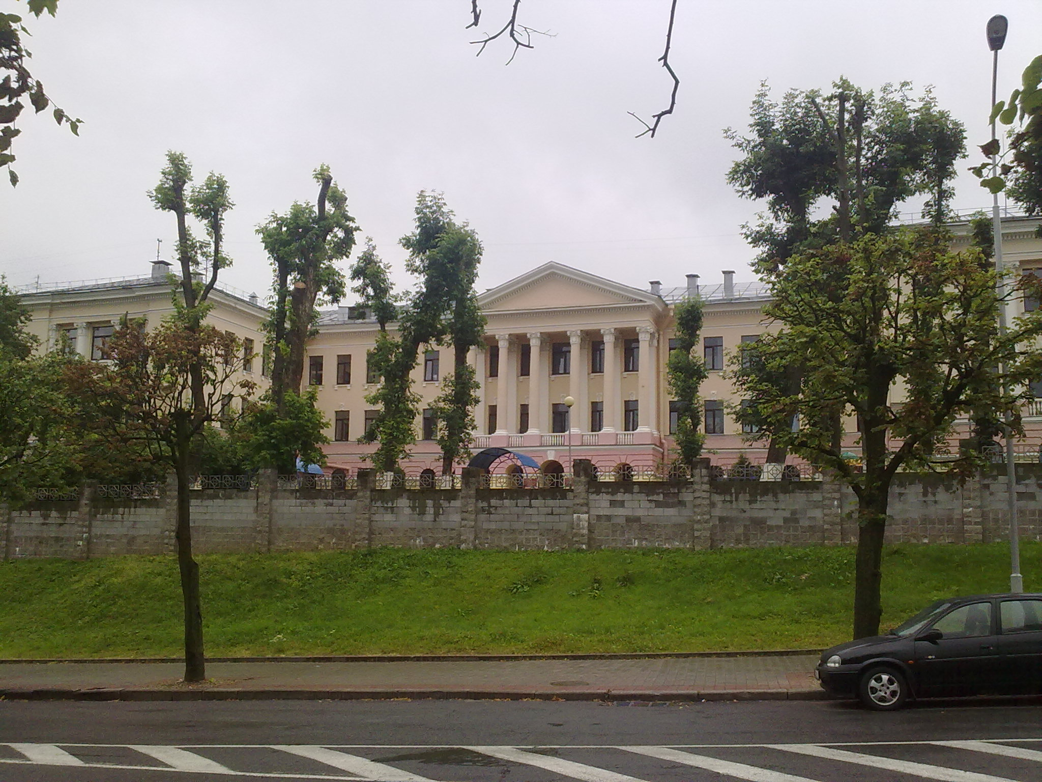 Мінск. Вуліца Валадарскага. 2012